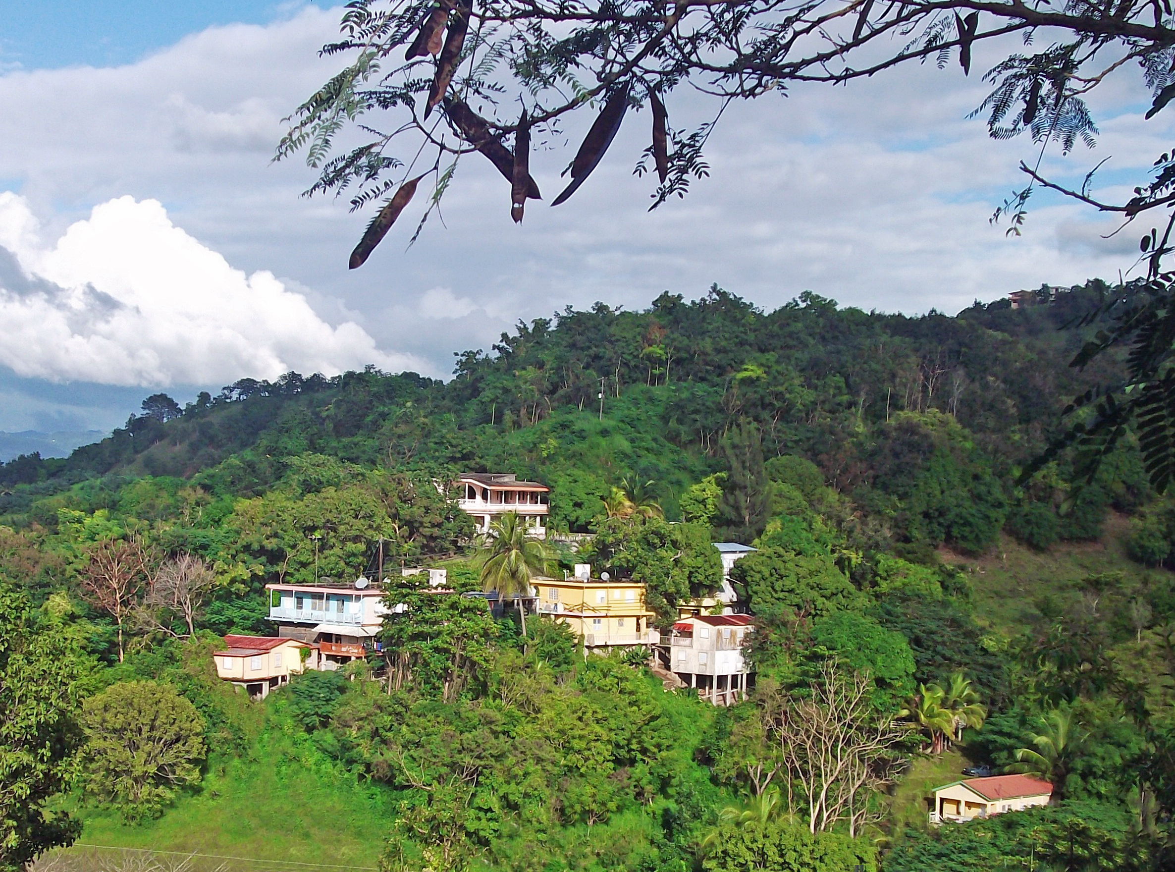 La Cocaleca - El Campo